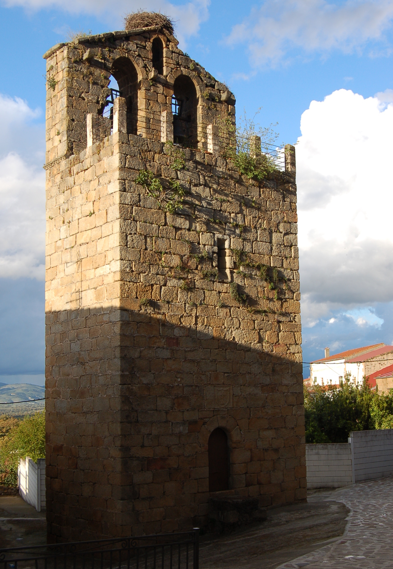 Campanario de Santa Cruz de Paniagua